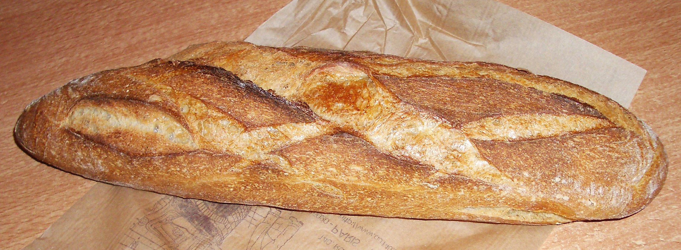 Pain au levain à l'ancienne. Goût assez fort, très alvéolé, croustillant.